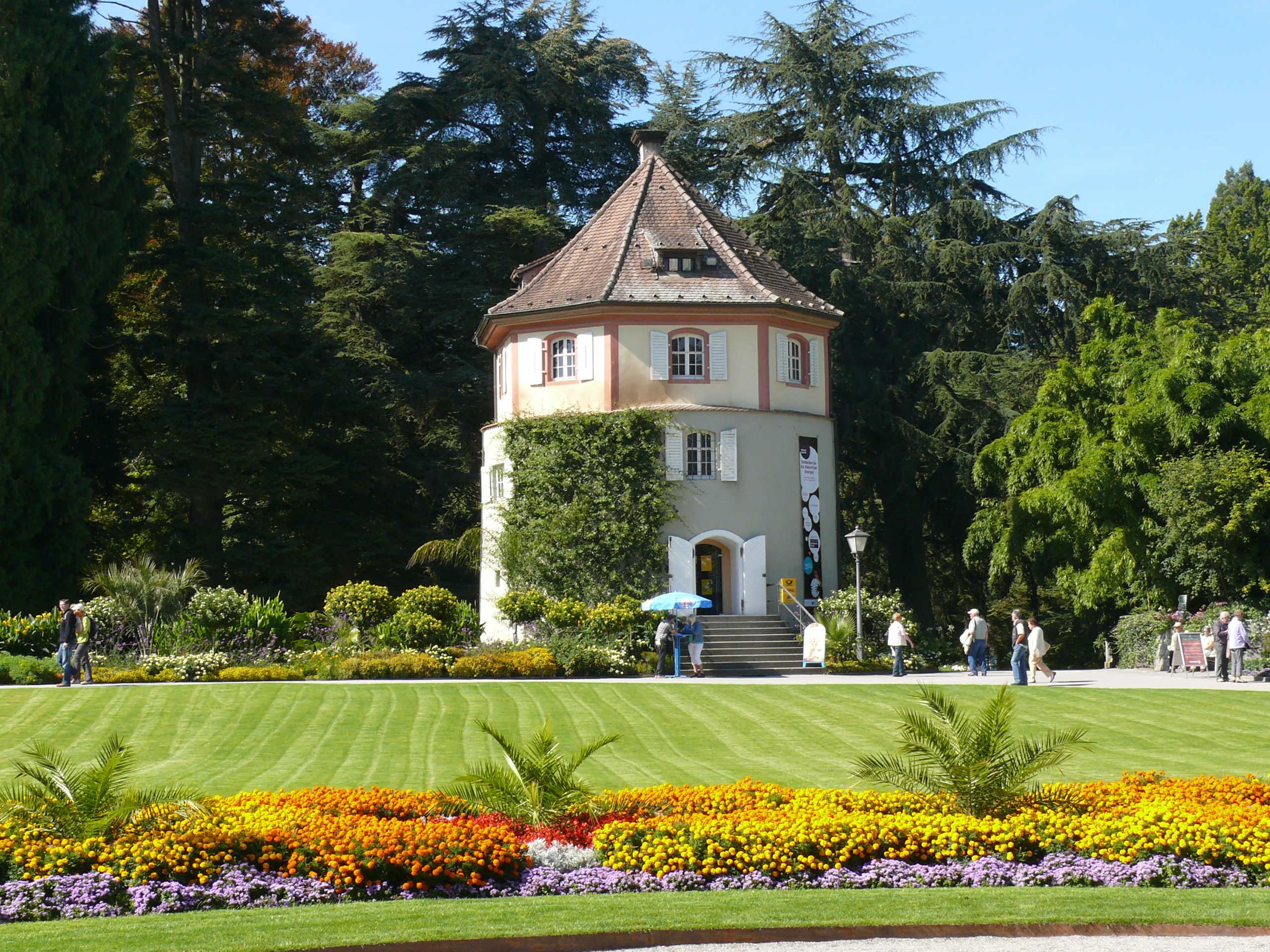 Gärtnerturm auf der Insel Mainau